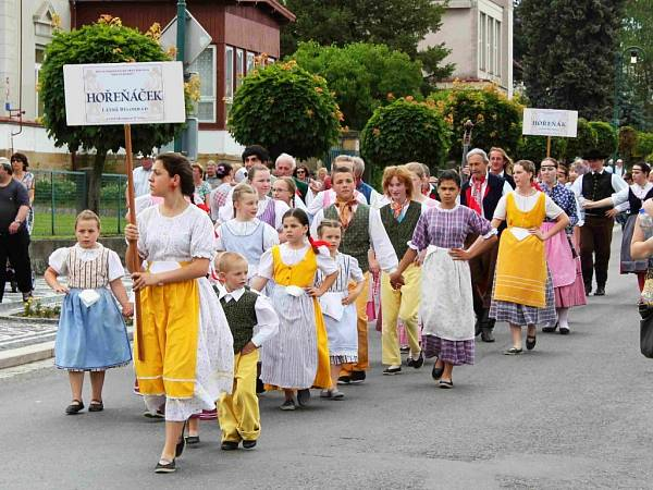 Průvod